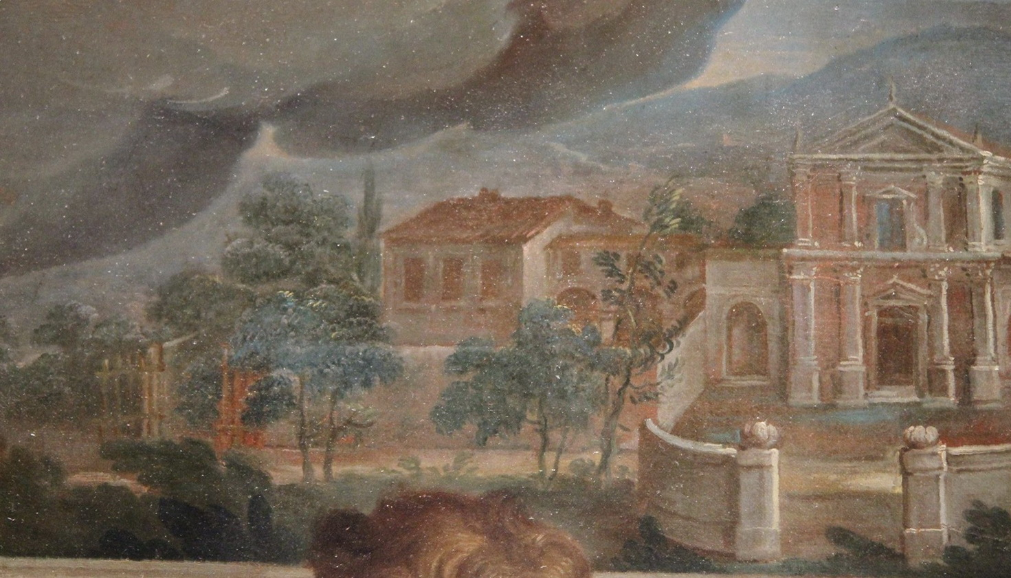 Particolare della pala della Vergine col Bambino e San Zenone di Sante Cattaneo